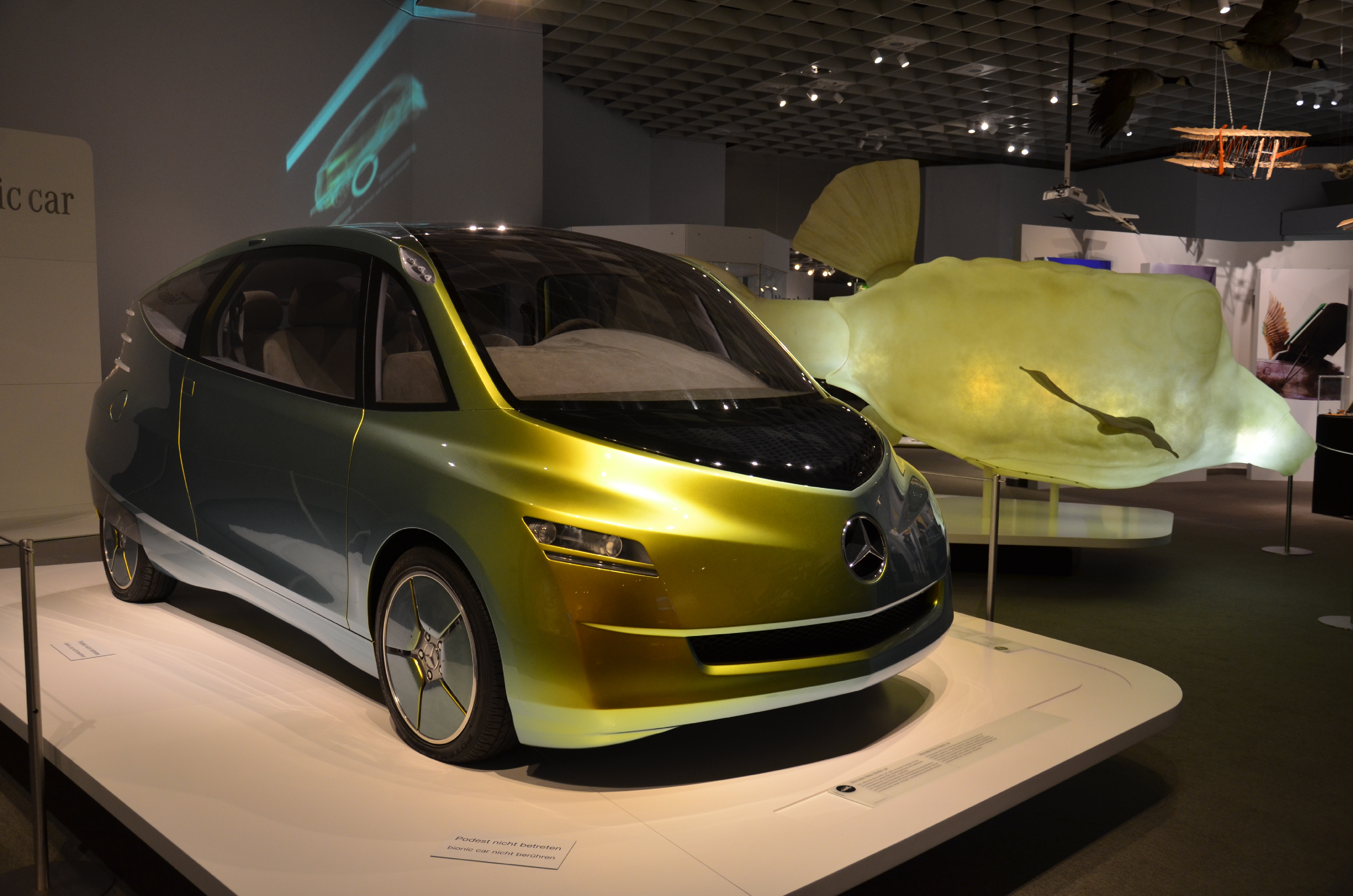 Mercedes-Benz bionic car in der Bionik-Ausstellung des LWL Naturkundemuseums in Münster, 2012